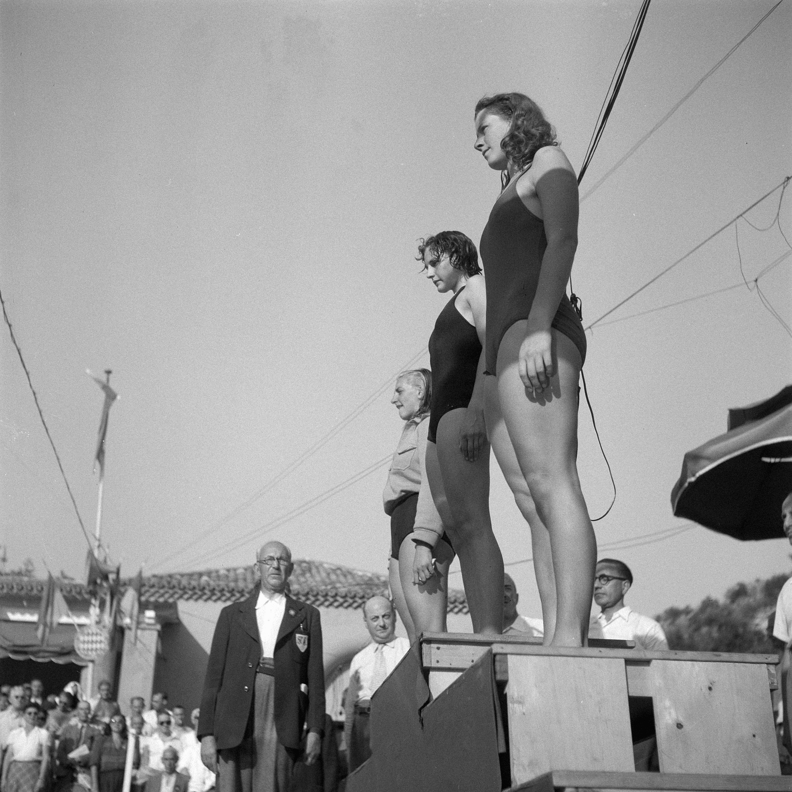 Europese zwemkampioenschappen te Monaco. Hannie Termeulen (geheel links), tweede op 100 meter vrije slag tijdens ceremonie protocollaire. In het midden winnares Fritze Nathansen (Denemarken), rechts Greta Andersen (Denemarken), 3e